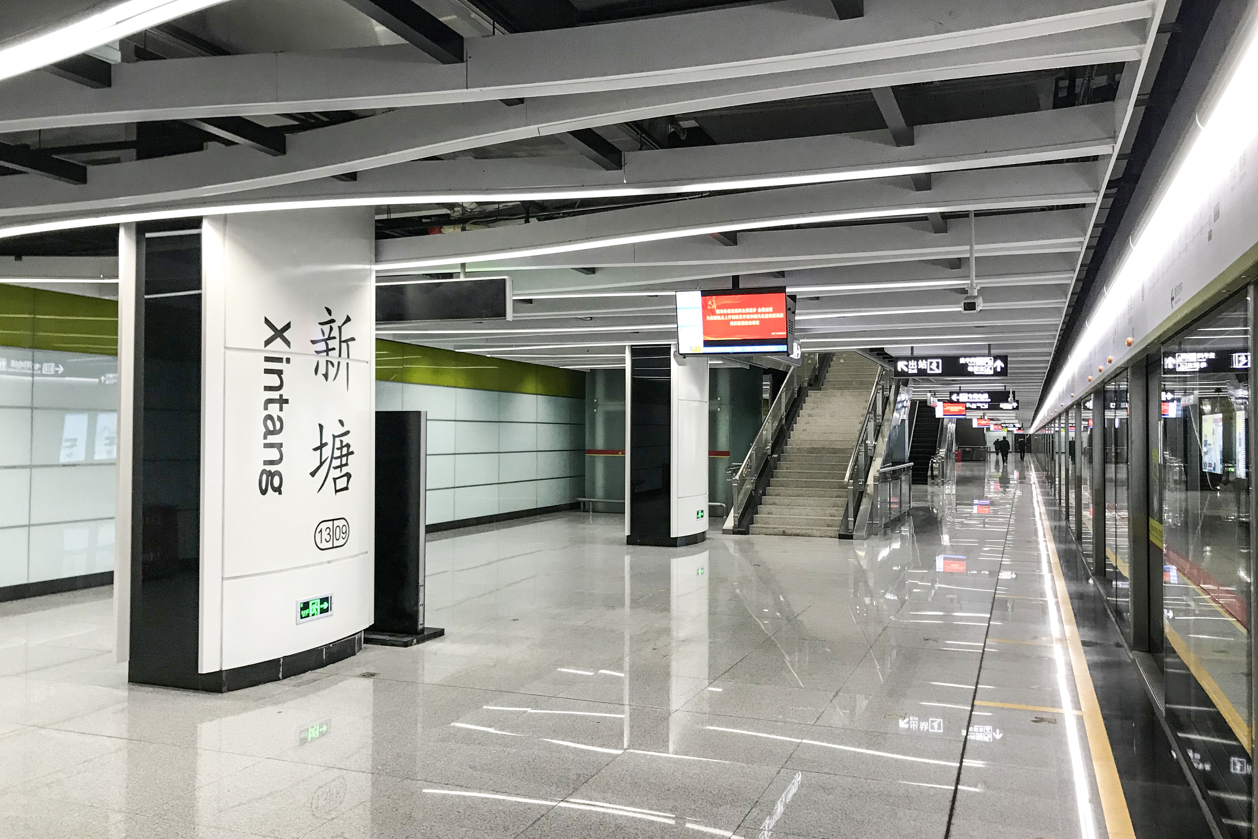 广州地铁新塘站